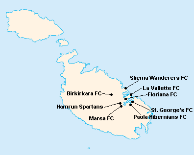 Répartition des clubs en First Division Maltaise 1959-1960.